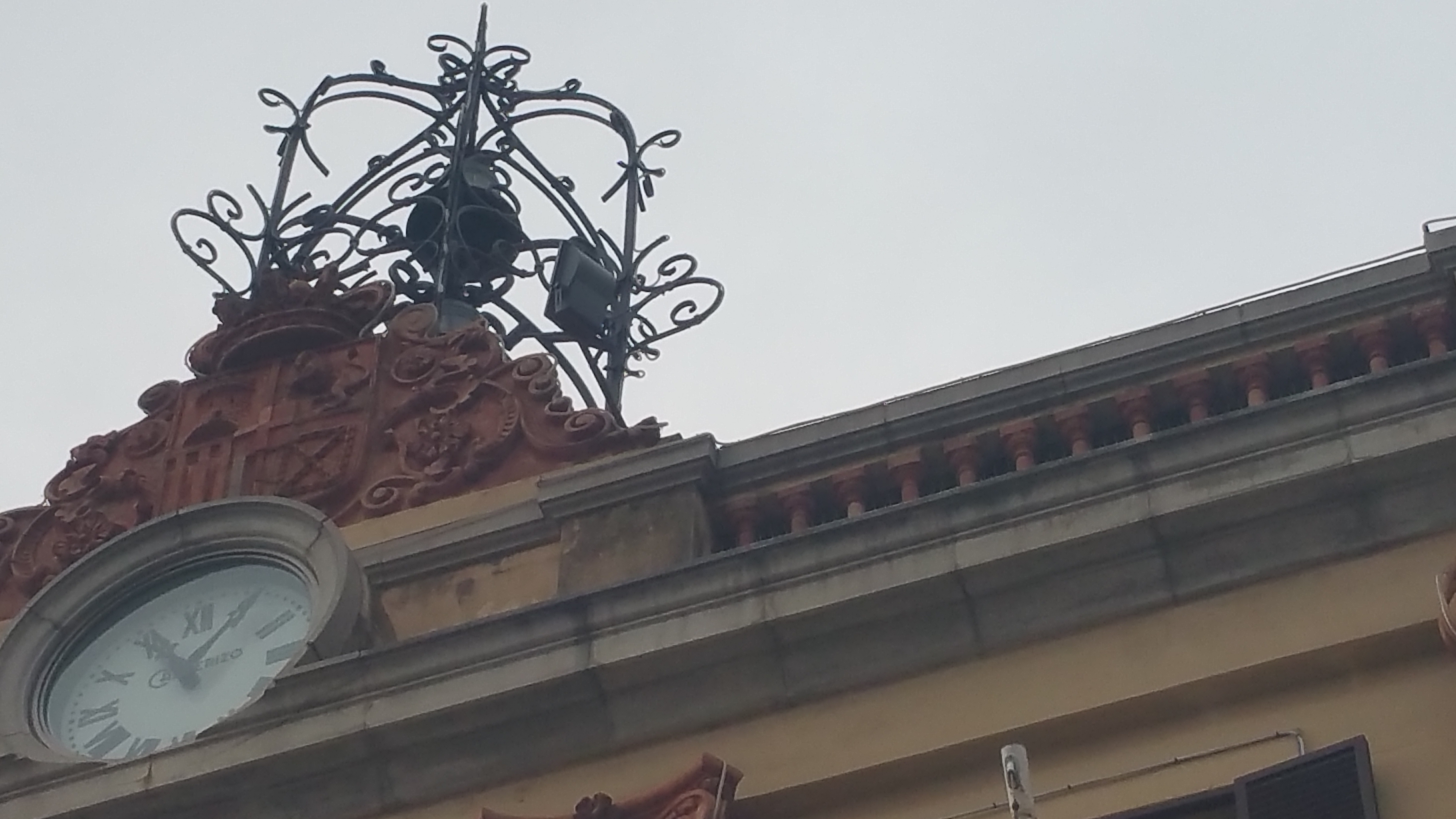 Ajuntament (Lloret de Mar)